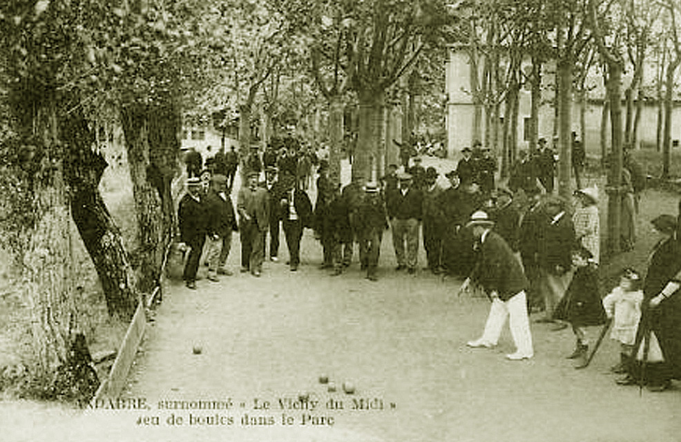 Jeu provençal à Andabre, commune de Gissac dans l'Aveyron, avant 1910, date de l'invention de la pétanque